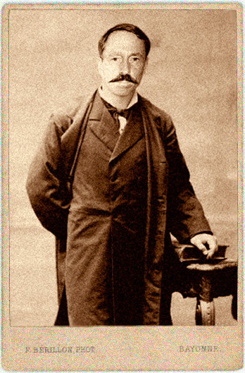 Fotografía de Colección familiar.